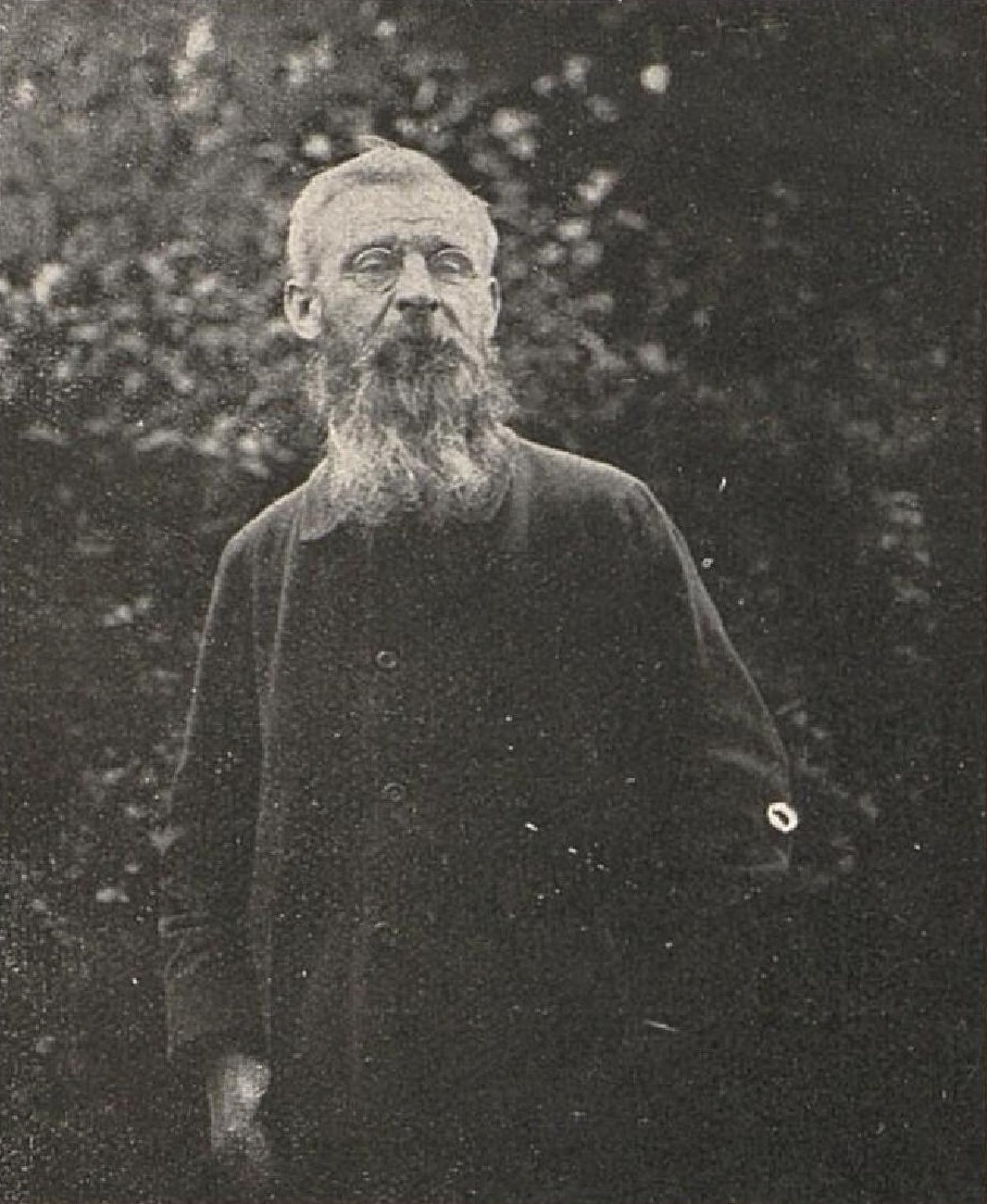 Jan Vochoč (1865-1920), český malíř